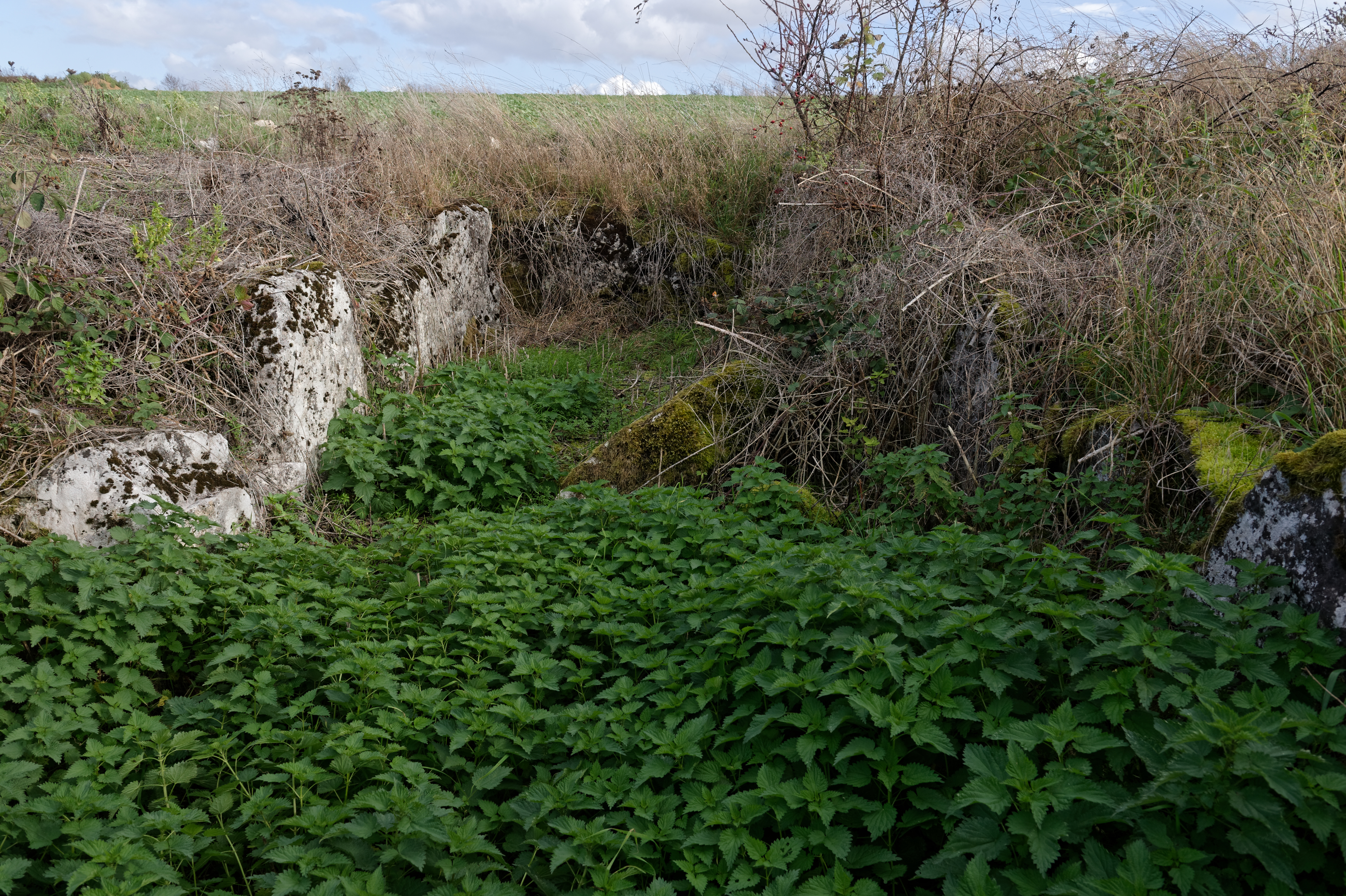 Allée couverte de Copierres (dite aussi dolmen de la Vieille Côte) à Montreuil-sur-Epte, dans le Val-d'Oise.